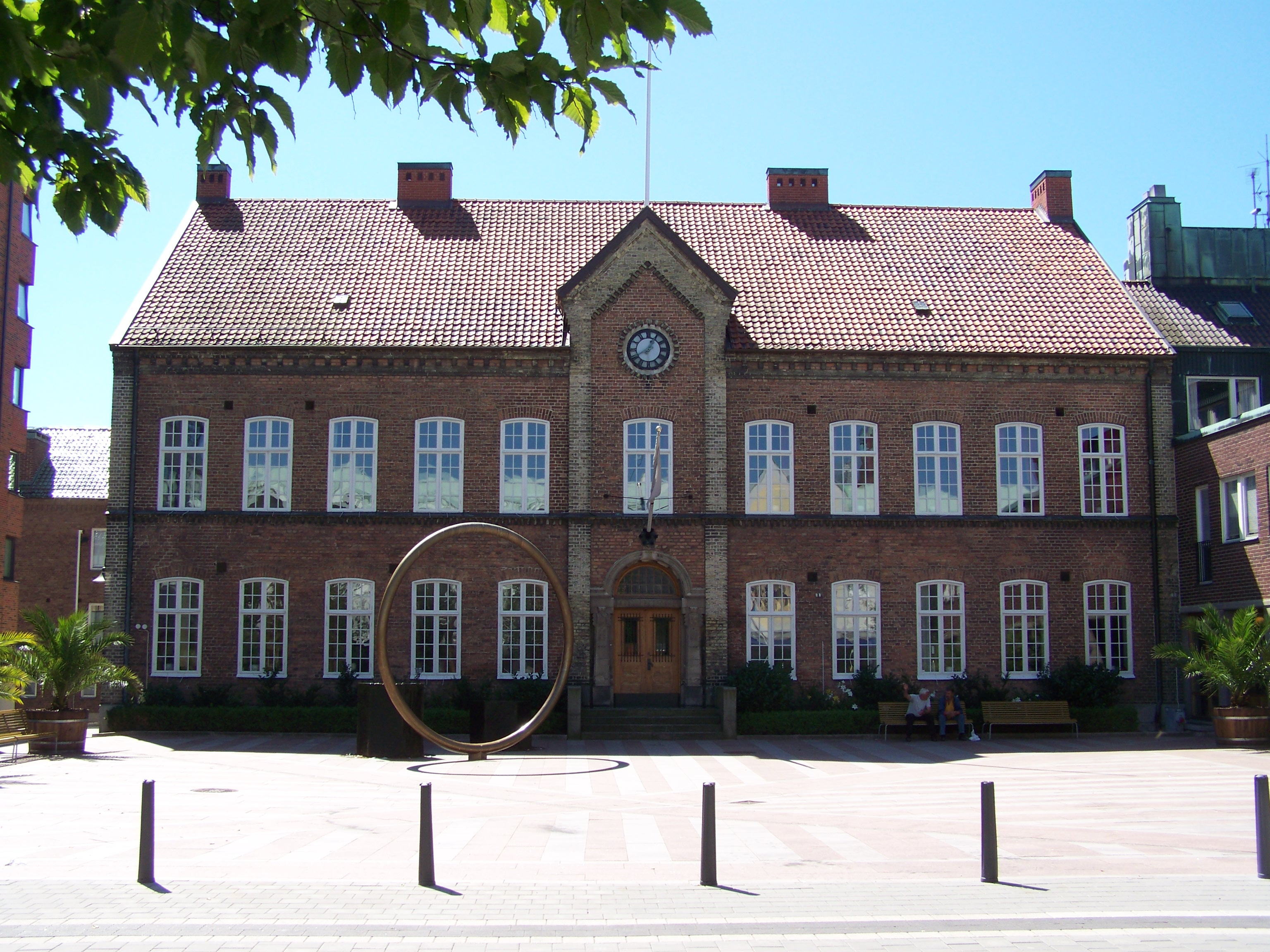 Trelleborg, Rathaus (råthuset)